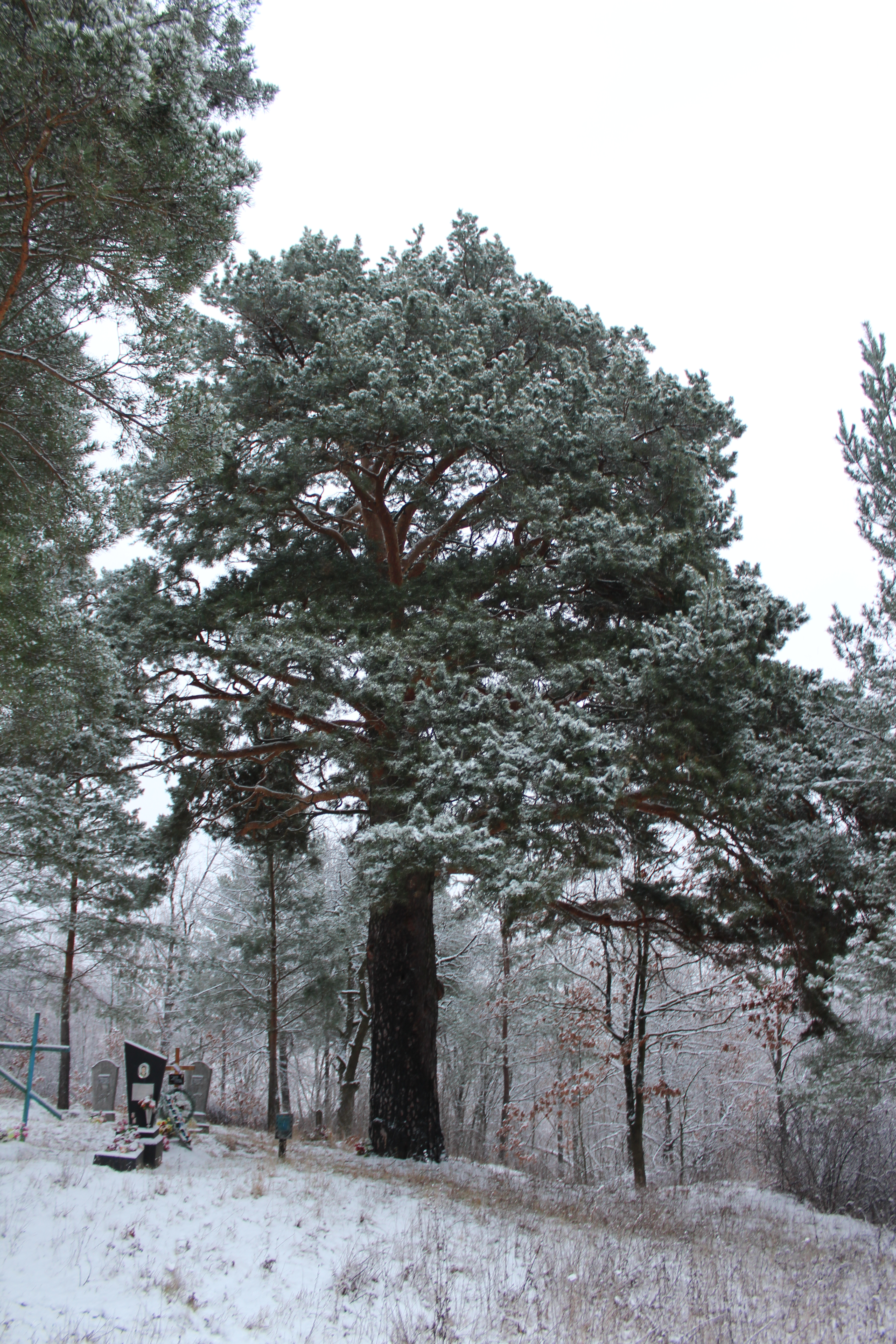 «Дерева Паліцина», Сумський р-н: Верхньосироватська с/р, с. Залізняк. Світлини були зроблені під час зйомки фільму «Паліцинська академія Сумського району»